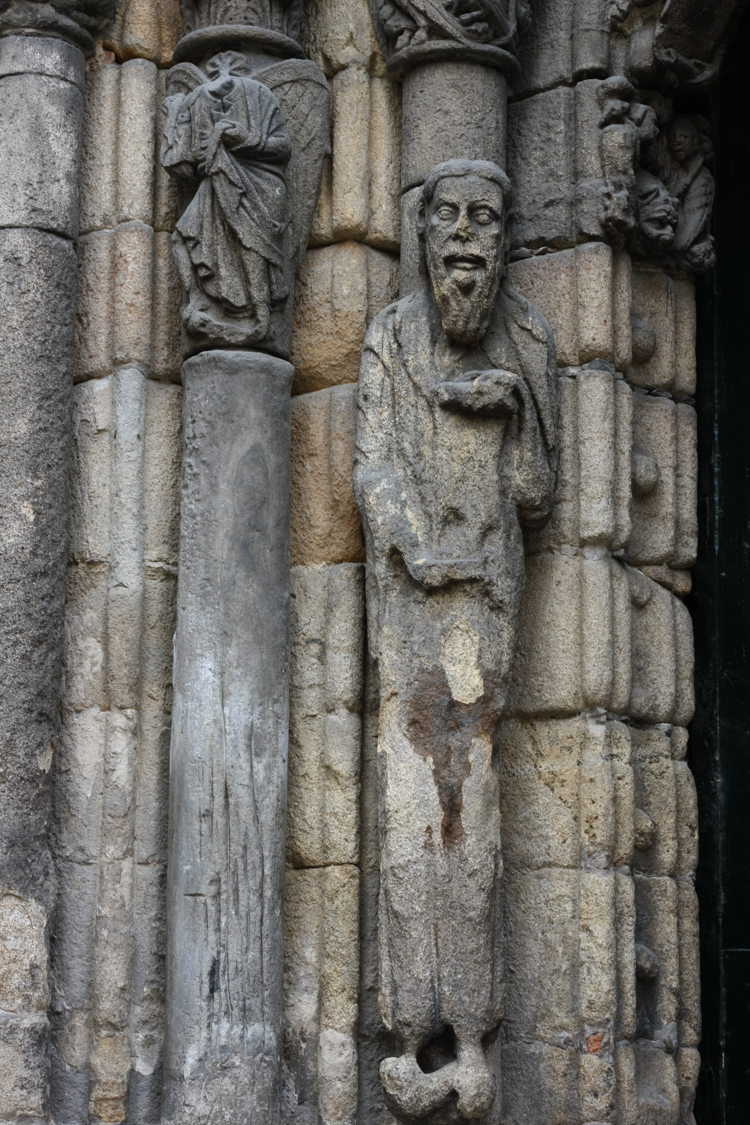 Kathedrale von Ourense, Portal des nördlichen Querhauses mit Gewändefigur